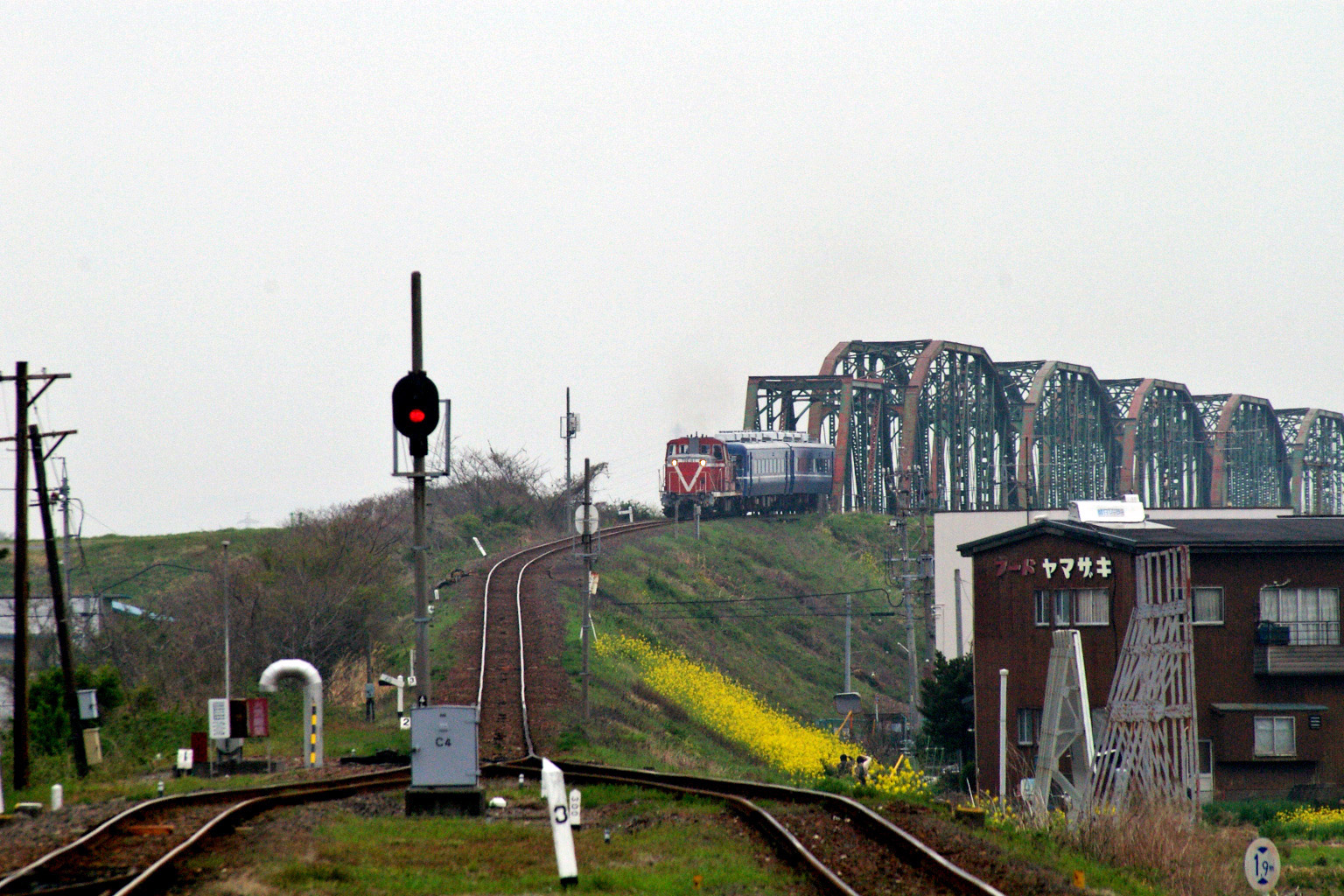 東大垣駅より揖斐川橋梁を臨む